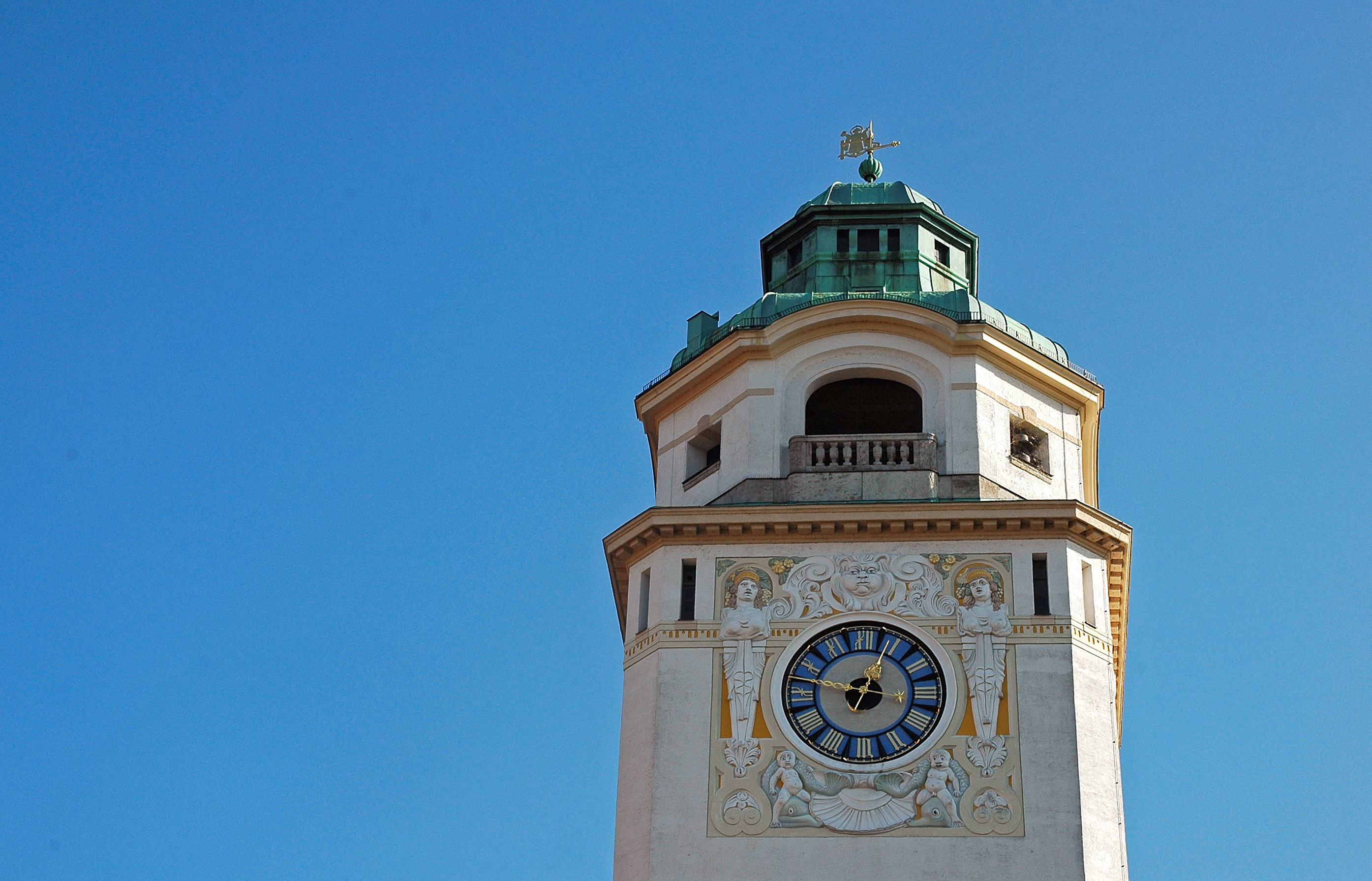 Müllersches Volksbad (München) - Uhrenturm